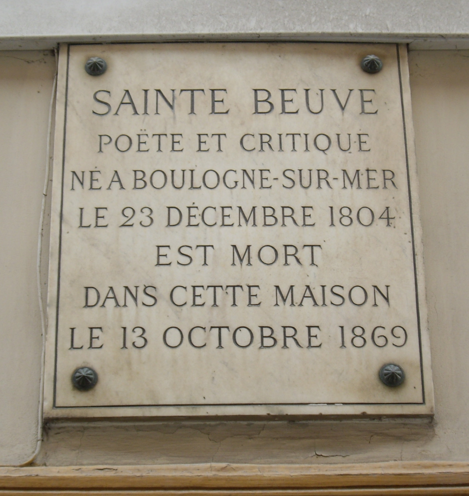 Plaque apposée au n° 11 de le rue du Montparnasse, Paris 6e, où mourut le poète et critique littéraire Charles-Augustin Sainte-Beuve (1804-1869) le 13 octobre 1869.